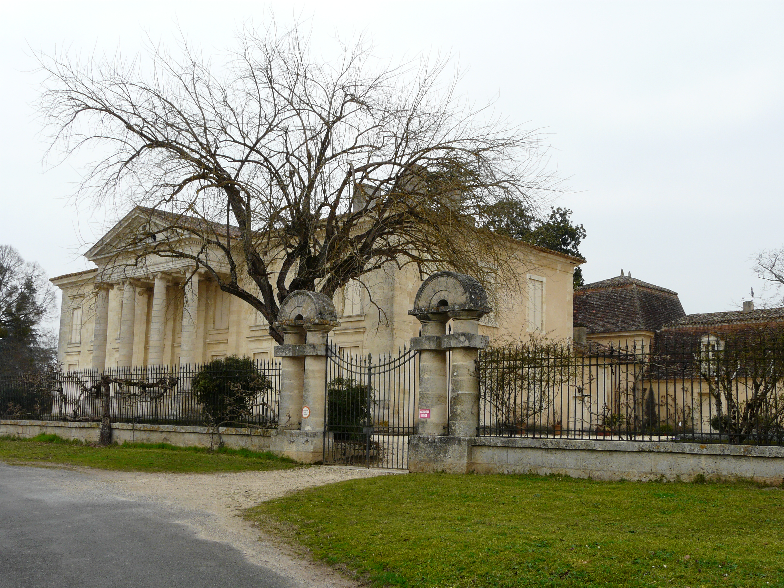 Le portail occidental du château de Prats, Saint-Seurin-de-Prats, Dordogne, France.